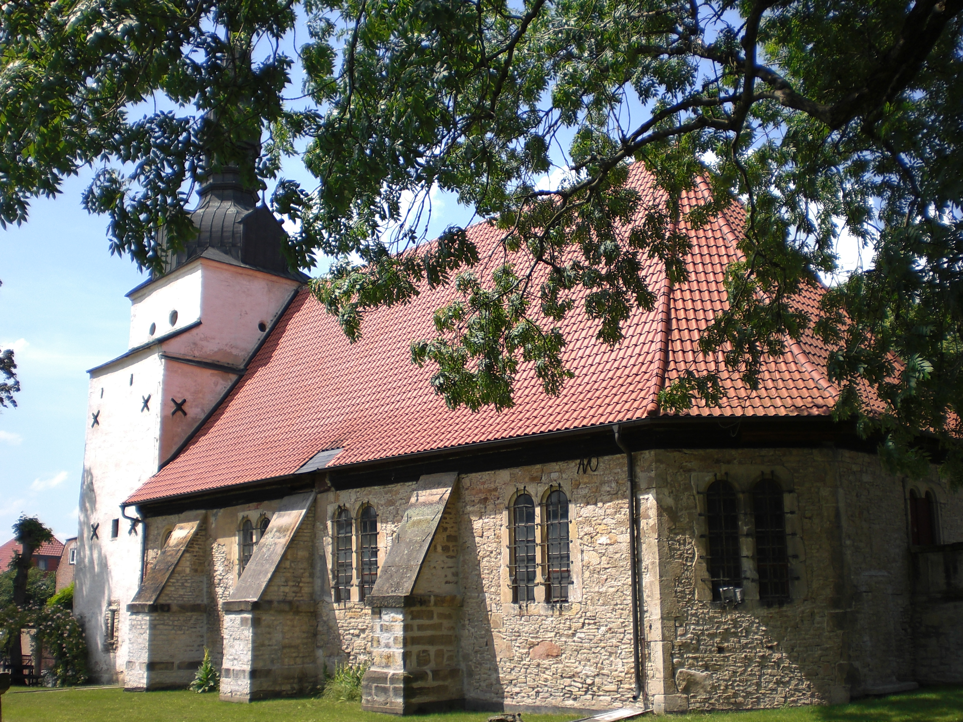 St. Bartholomäus Kirche in Hötensleben, Südseite